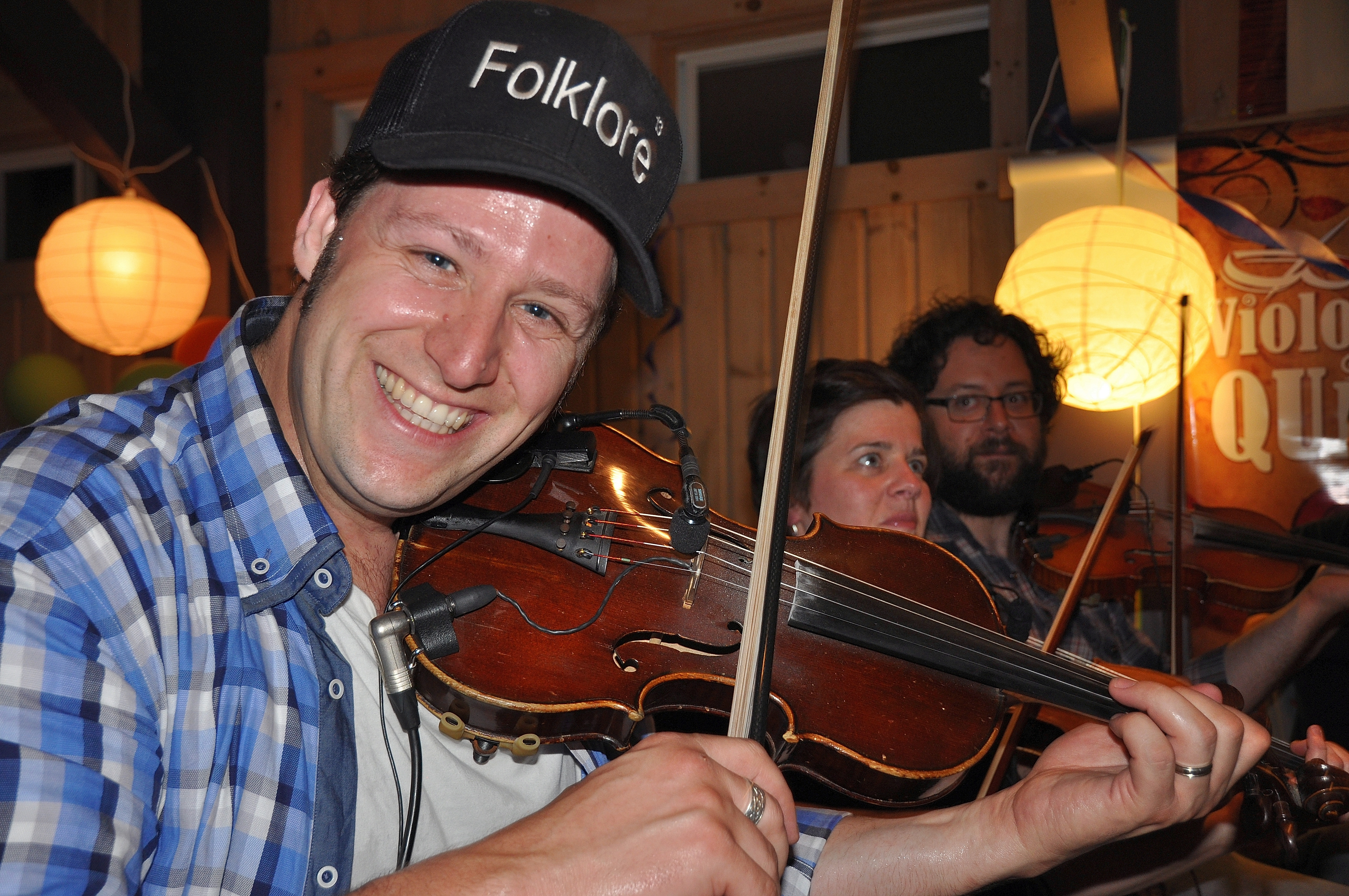 André Brunet au Camp Violon Trad Québec 2013